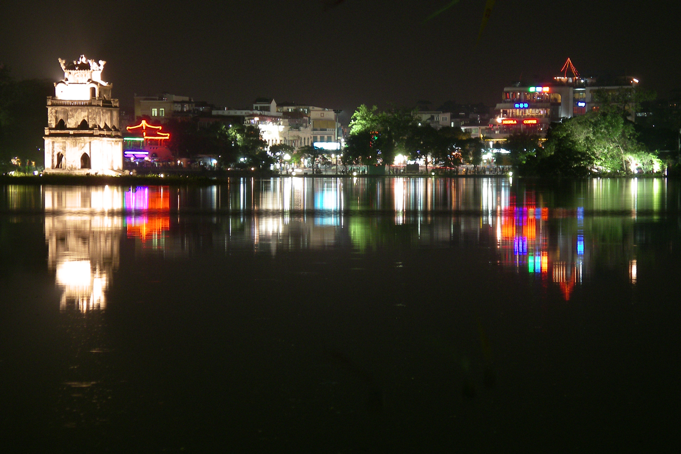 hanoi at night, Vietnamhanoi at night